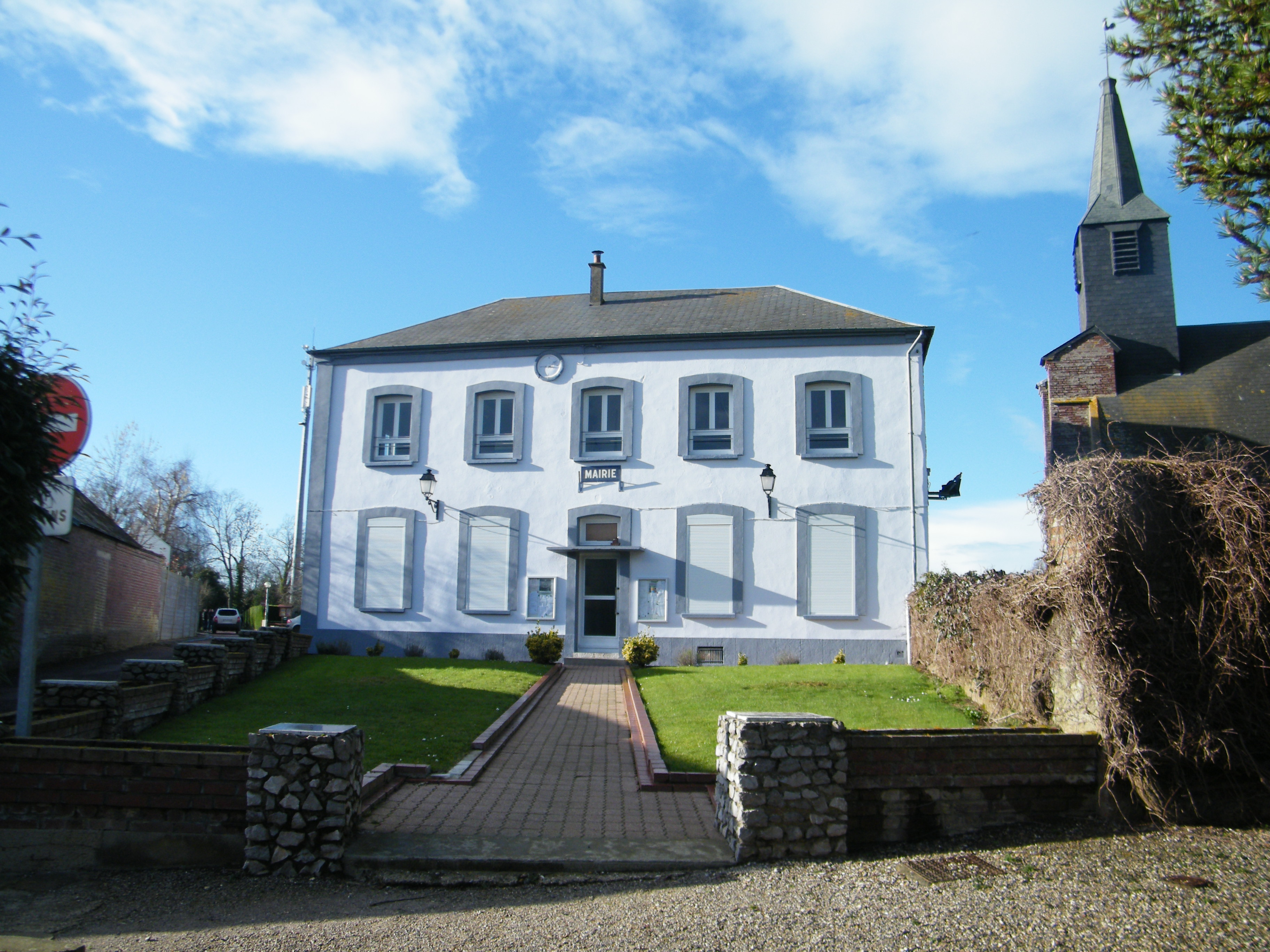 La mairie.